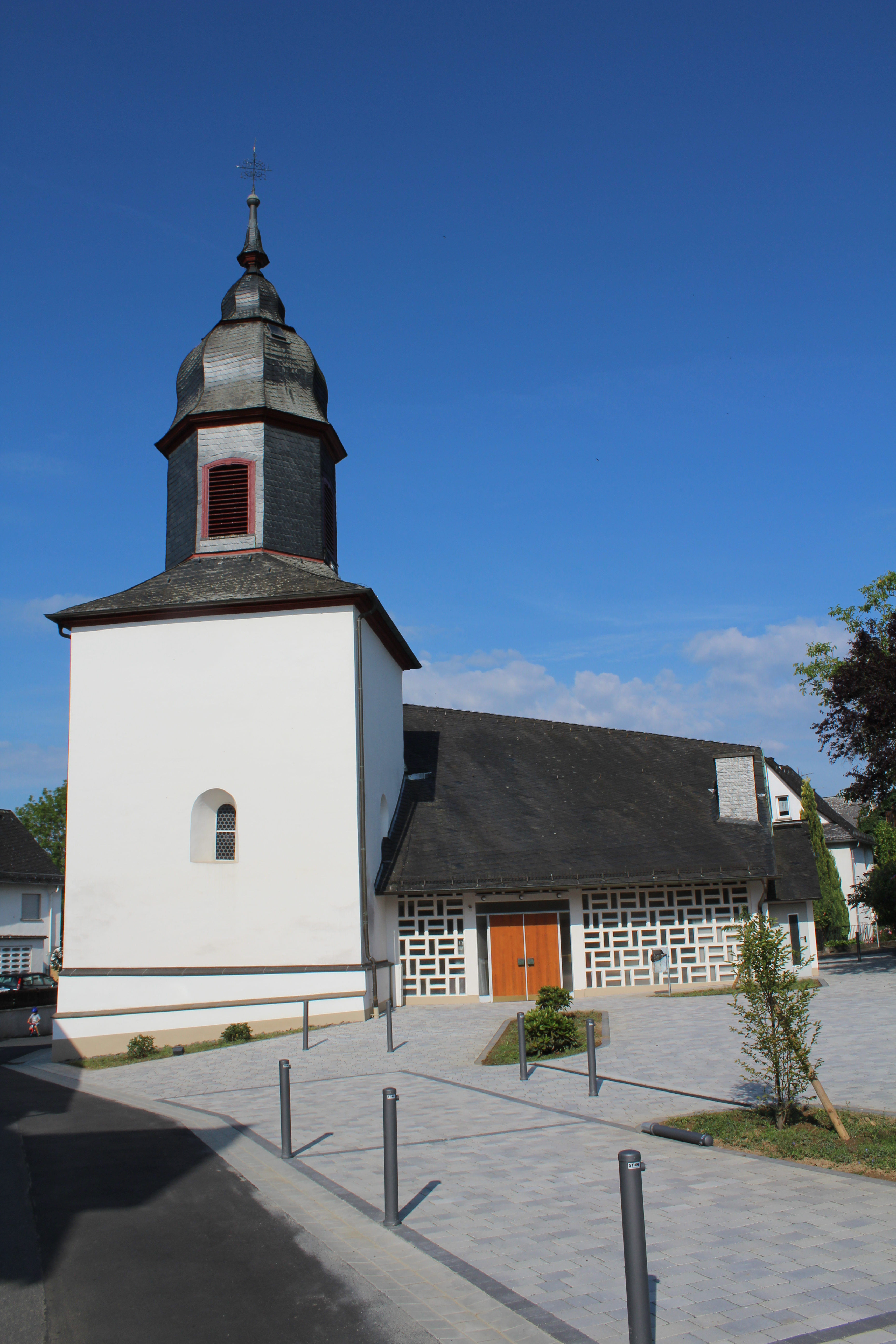 Evangelische Kirche Katzenfurt, Lahn-Dill-Kreis, Hessen, Deutschland